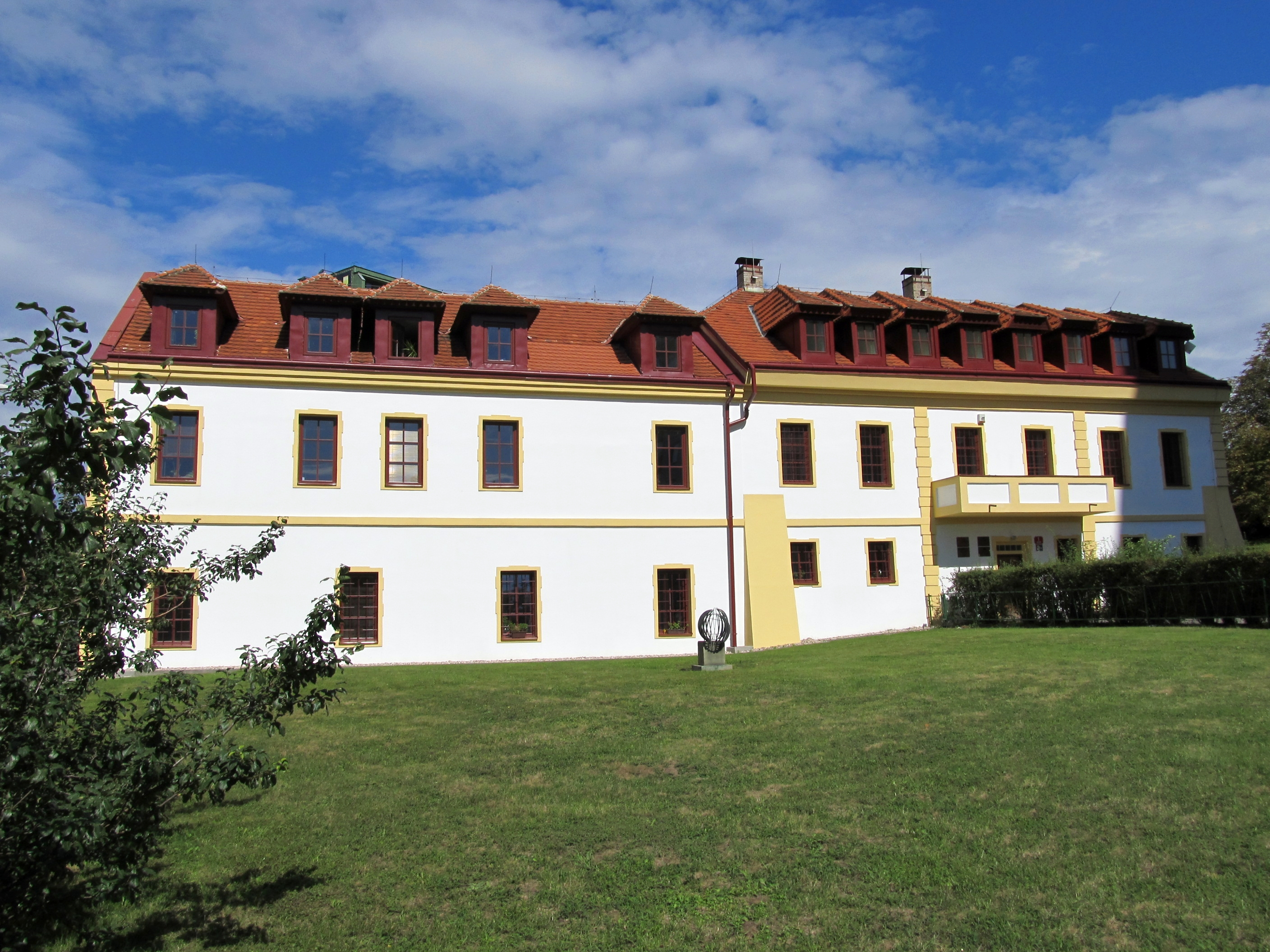 Svatojánský poplužní dvůr, Praha 8-Střížkov, Střížkovská 1/29.